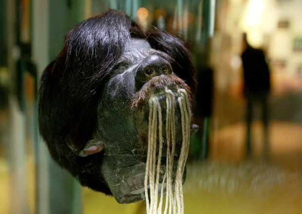 Jíbaros - Tzantza